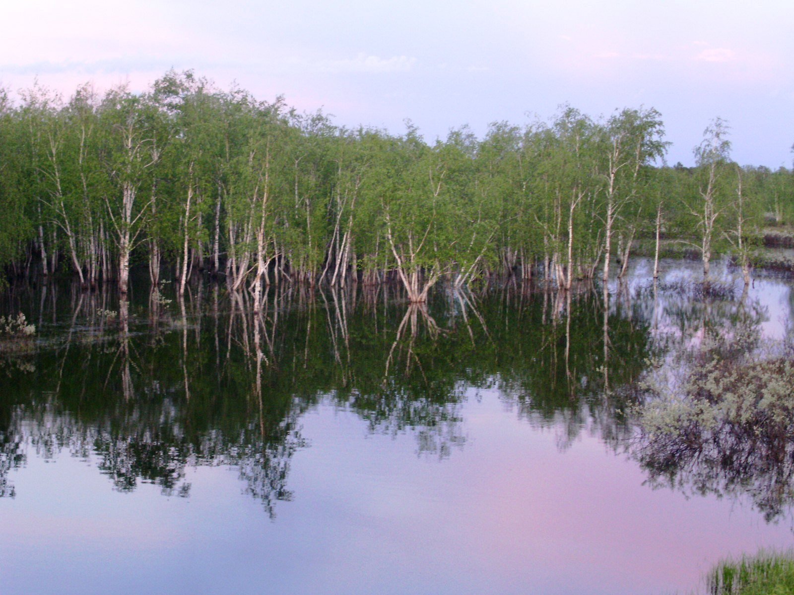 Кондинские озера, Советский район This image is related to the protected area of Russia number 8610026